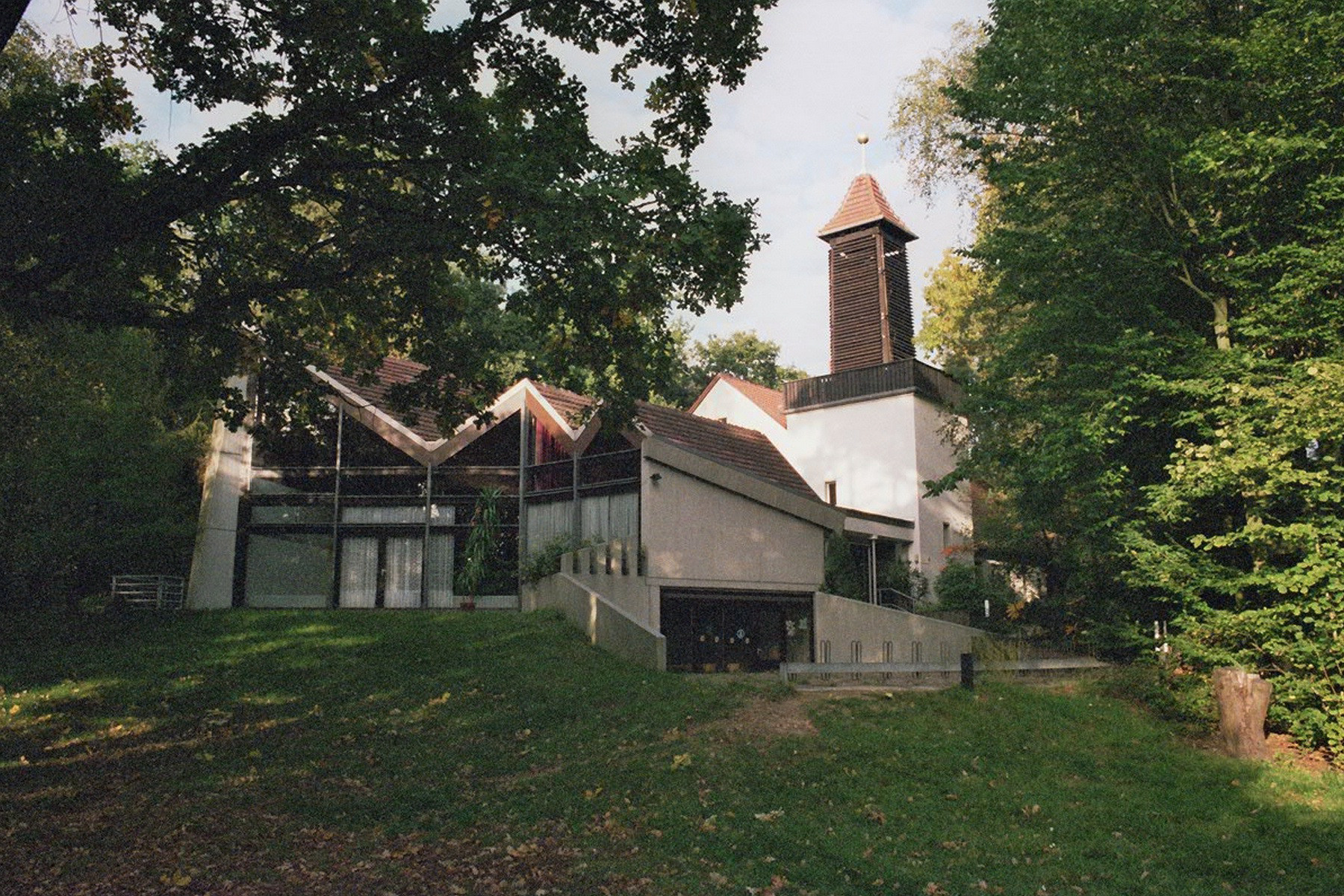 Waldkirche Heiligensee, Architekten: Walter Krüger (Kirche), Ludolf von Walthausen (Gemeindehaus)